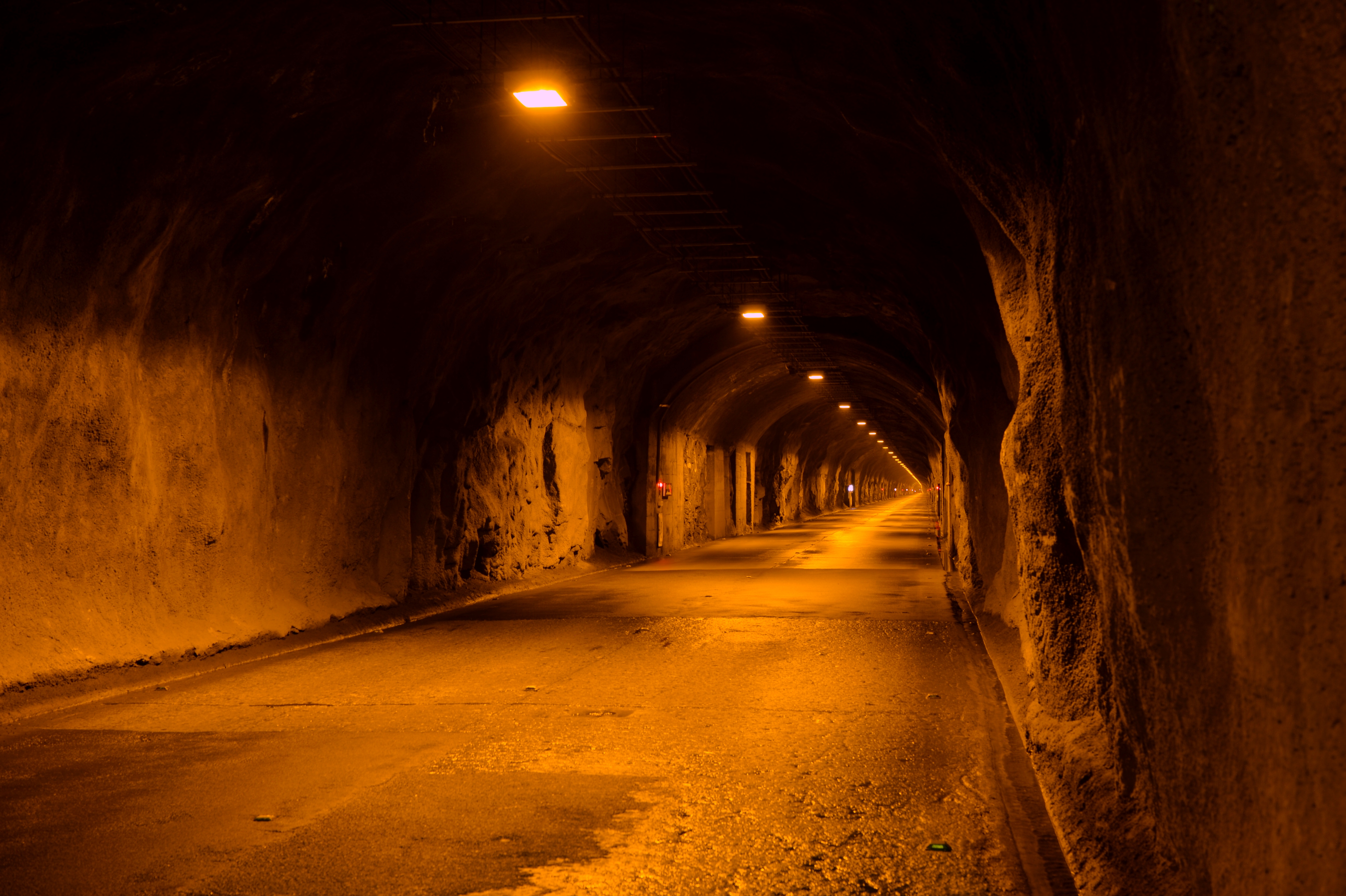 奥只見シルバーラインのトンネル内部の様子（18号トンネル 荒沢トンネル付近）。地下水が染み出し、岩肌が剥き出しているところもある。